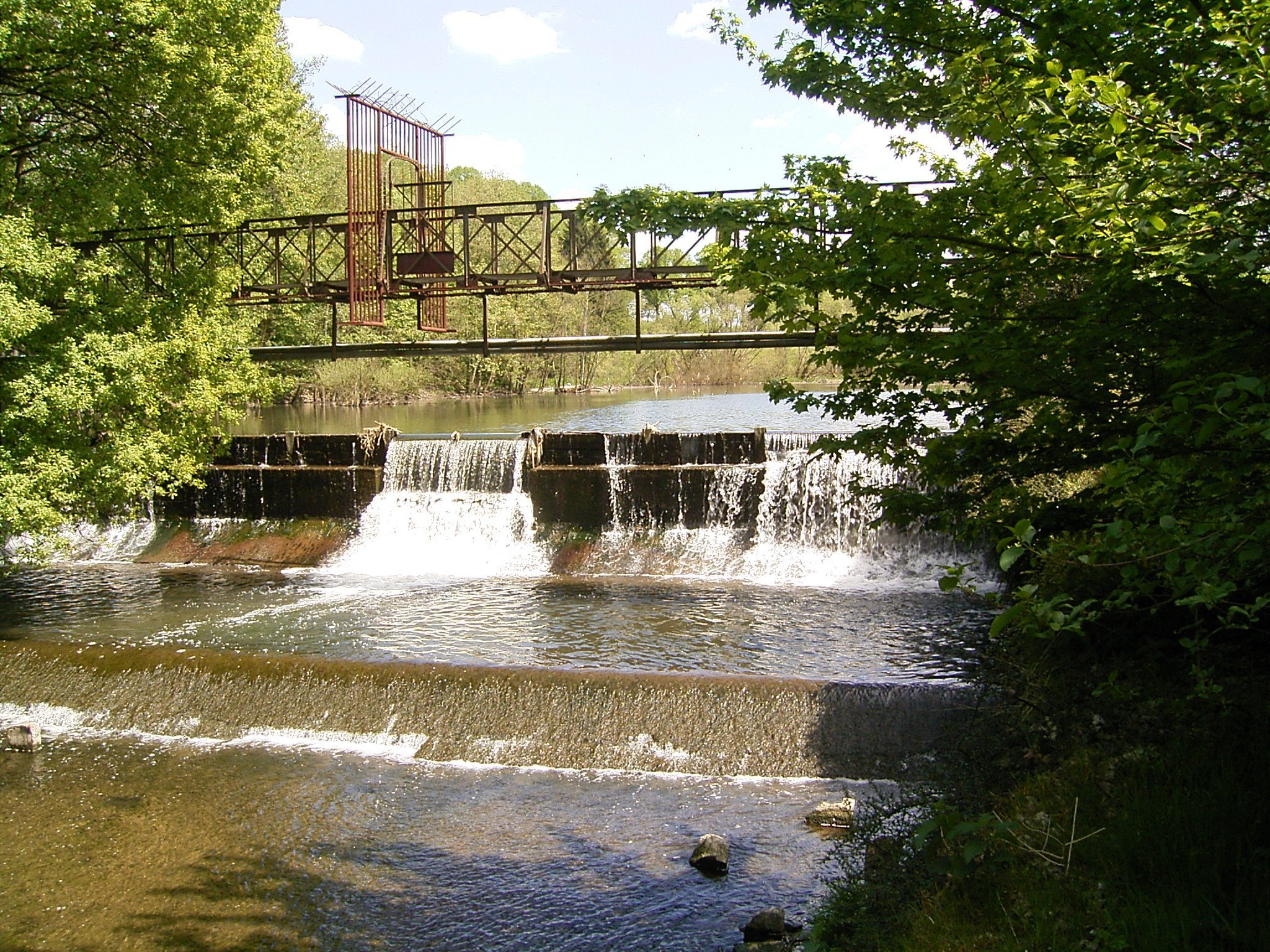 Wuppersteg Am Stauweiher in Wipperfürth